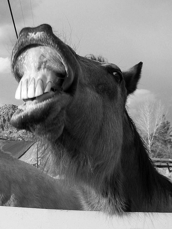 Flehmen response."save meeeeeee!"